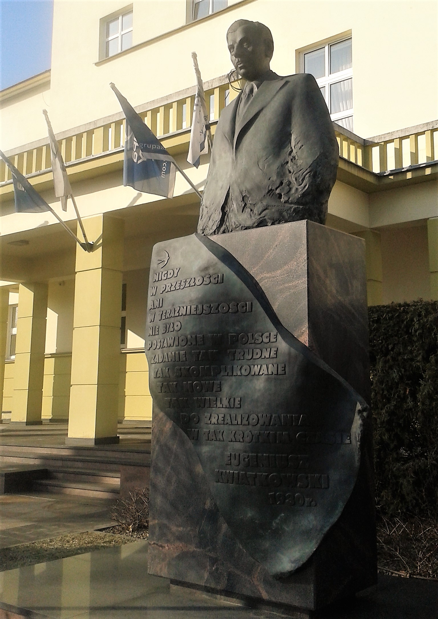 Pomnik Eugeniusza Kwiatkowskiego w tarnowskiej dzielnicy Mościce. Odsłonięty w 2012 roku. Dzieło Stanisława Szwechowicza. Stoi przy ul. Kwiatkowskiego, przed budynkiem dyrekcji Zakładów Azotowych.